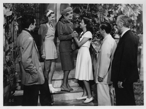 Fotografía blanco y negro, sobre papel fotográfico brillante marca Ridax, con marco perimetral blanco. Escena de la película La Gata (1947), con seis actores de pie, en la escalera del acceso exterior de una casa. De izquierda a derecha: Horacio Priani, Nélida Bilbao, Zully Moreno, Sabina Olmos, Enrique Álvarez Diosdado y Adolfo Linvel.